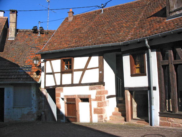 Cellier situé à l'intérieur de l'enceinte de Dossenheim sur Zinsel.